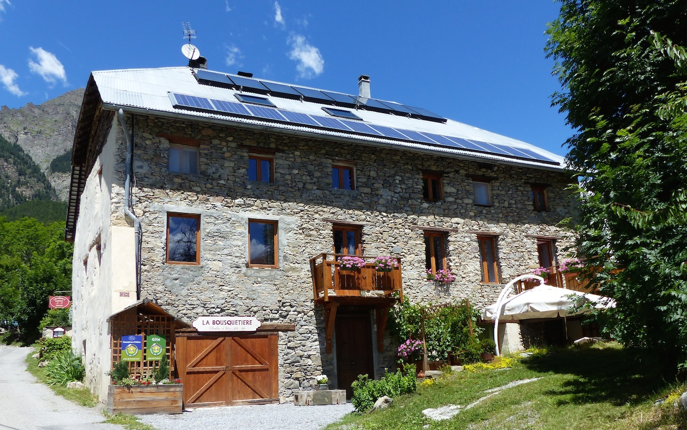 Jausiers, hameau des Sanières, La Bousquetière été